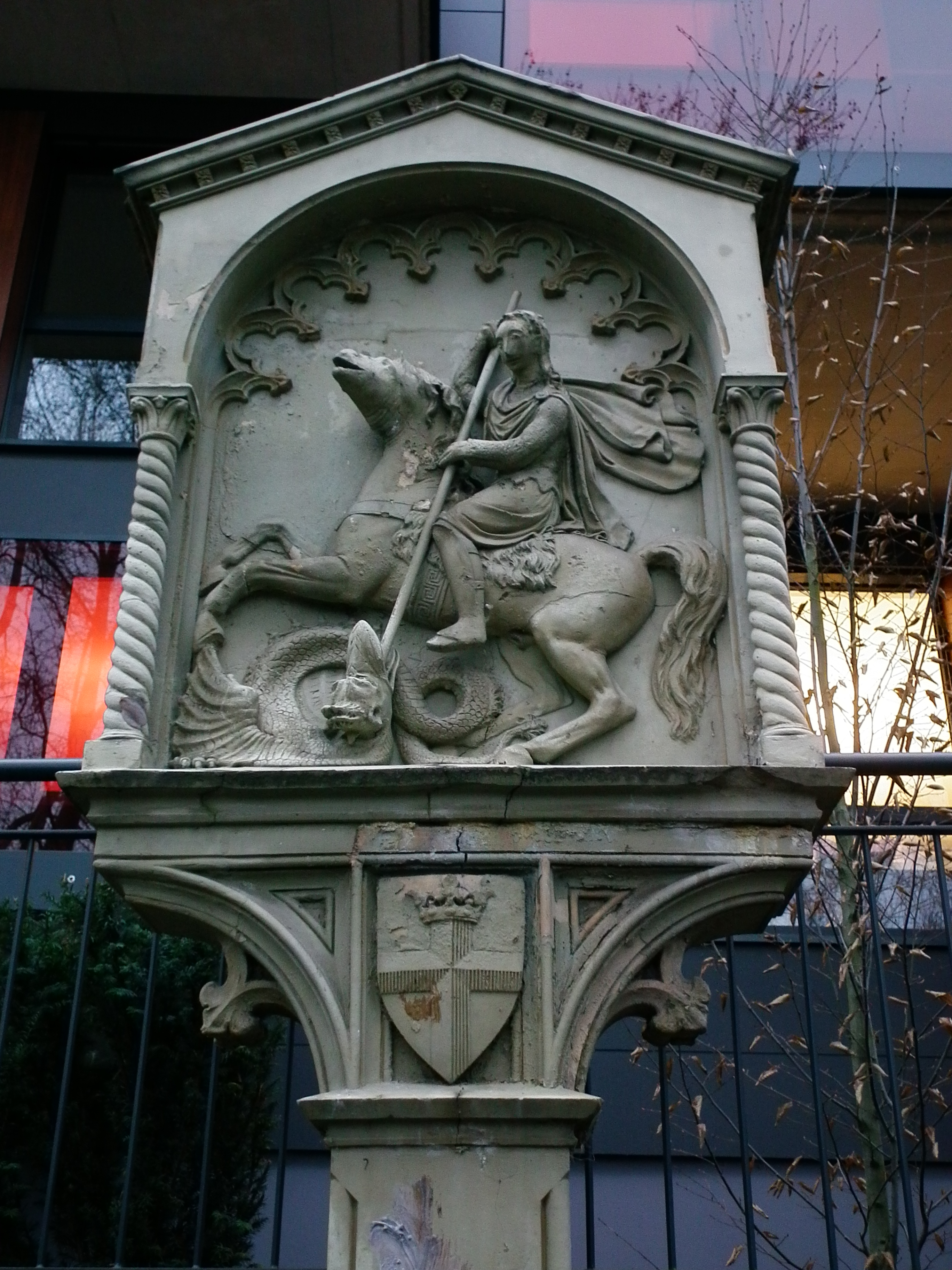 Reliefsäule (St.-Georg-Bildstock) in den Rheinanlagen von Koblenz